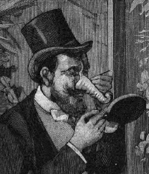 Détail d'une gravure figurant un départ pour le bal masqué du Mardi Gras.